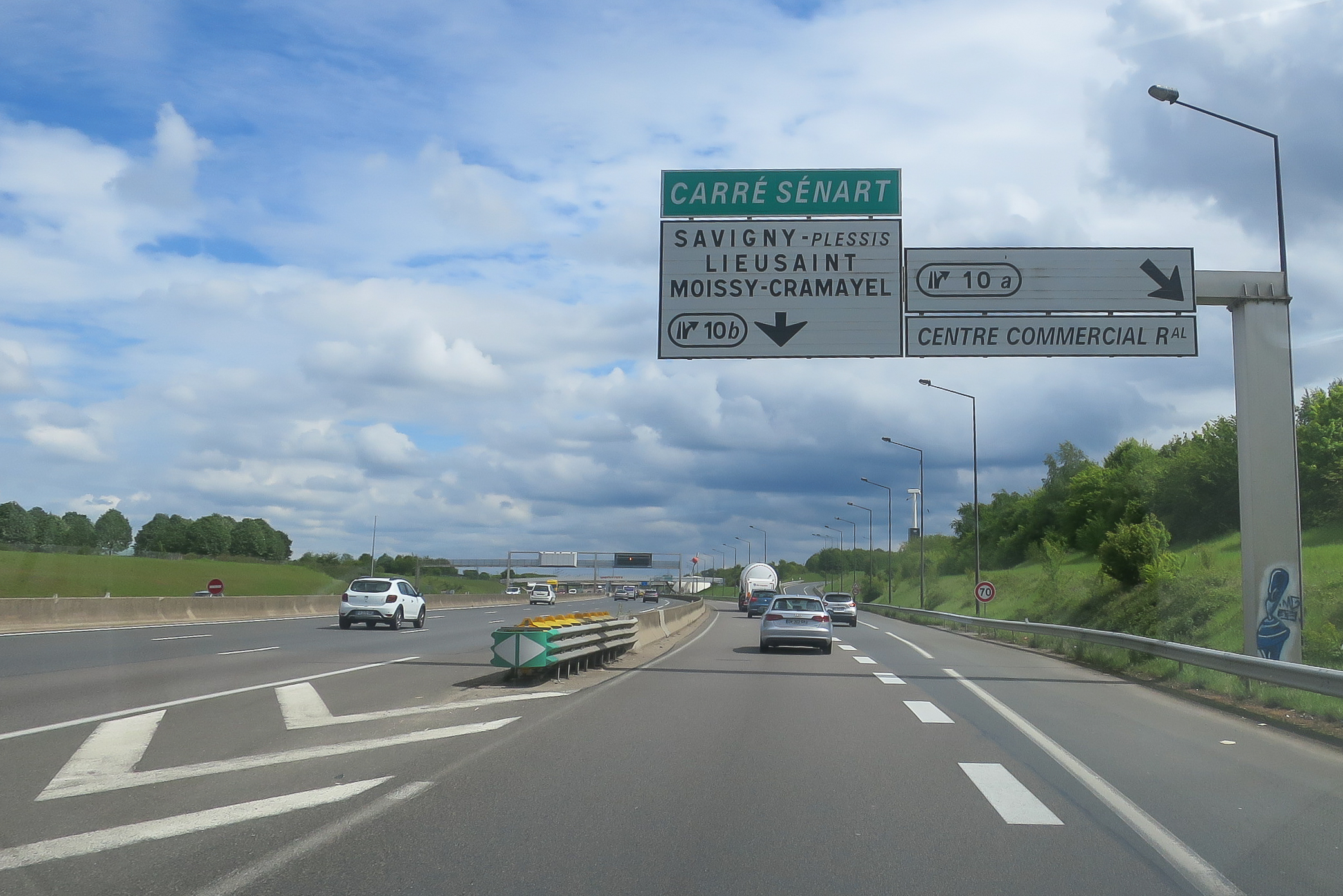 Vue de l'autoroute A5a au niveau de Lieusaint (Seine-et-Marne) - Sens Nord-Sud - Sorties 10a et 10b en direction de Carré Sénart et de Lieusaint